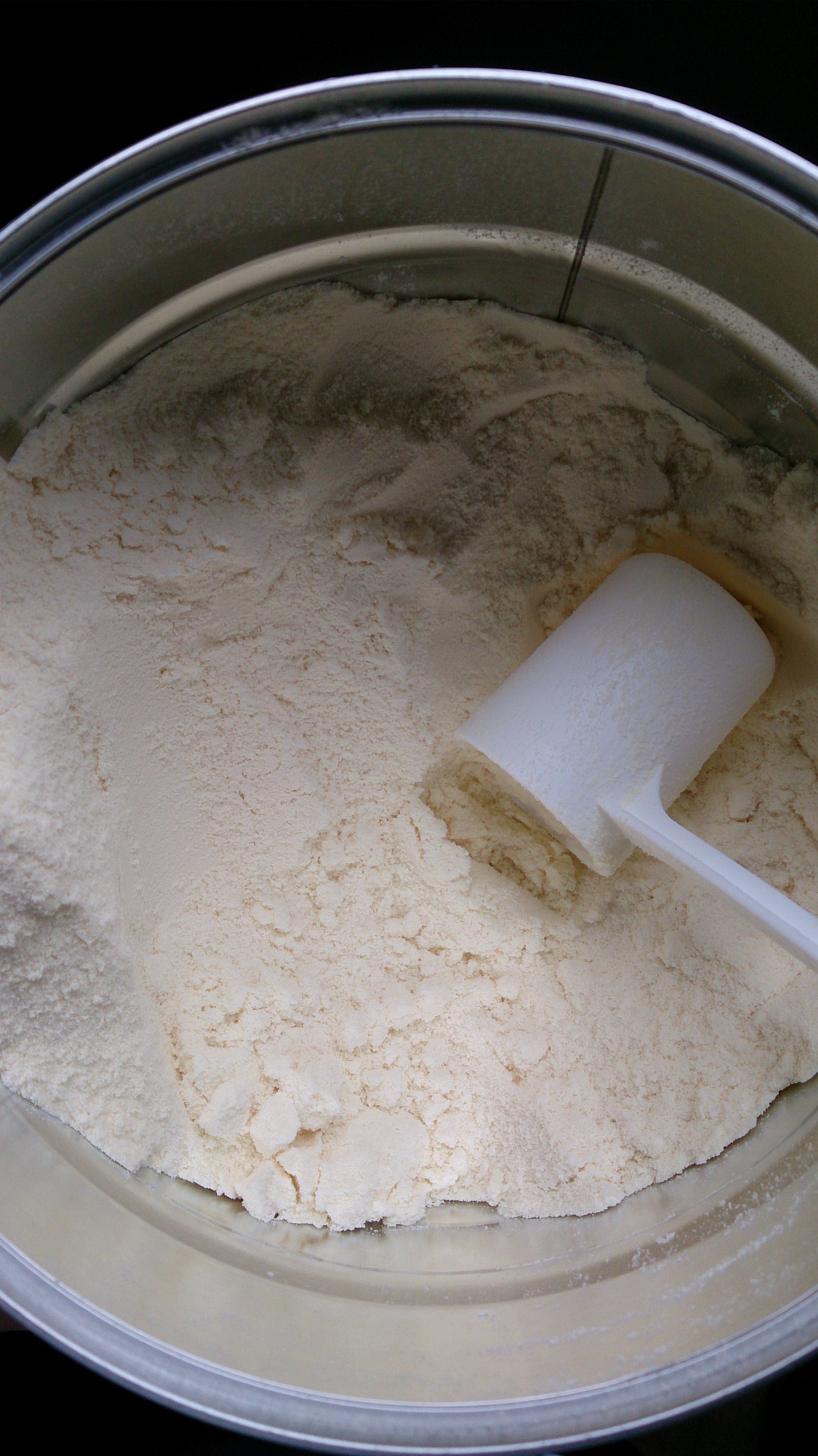 for making milk